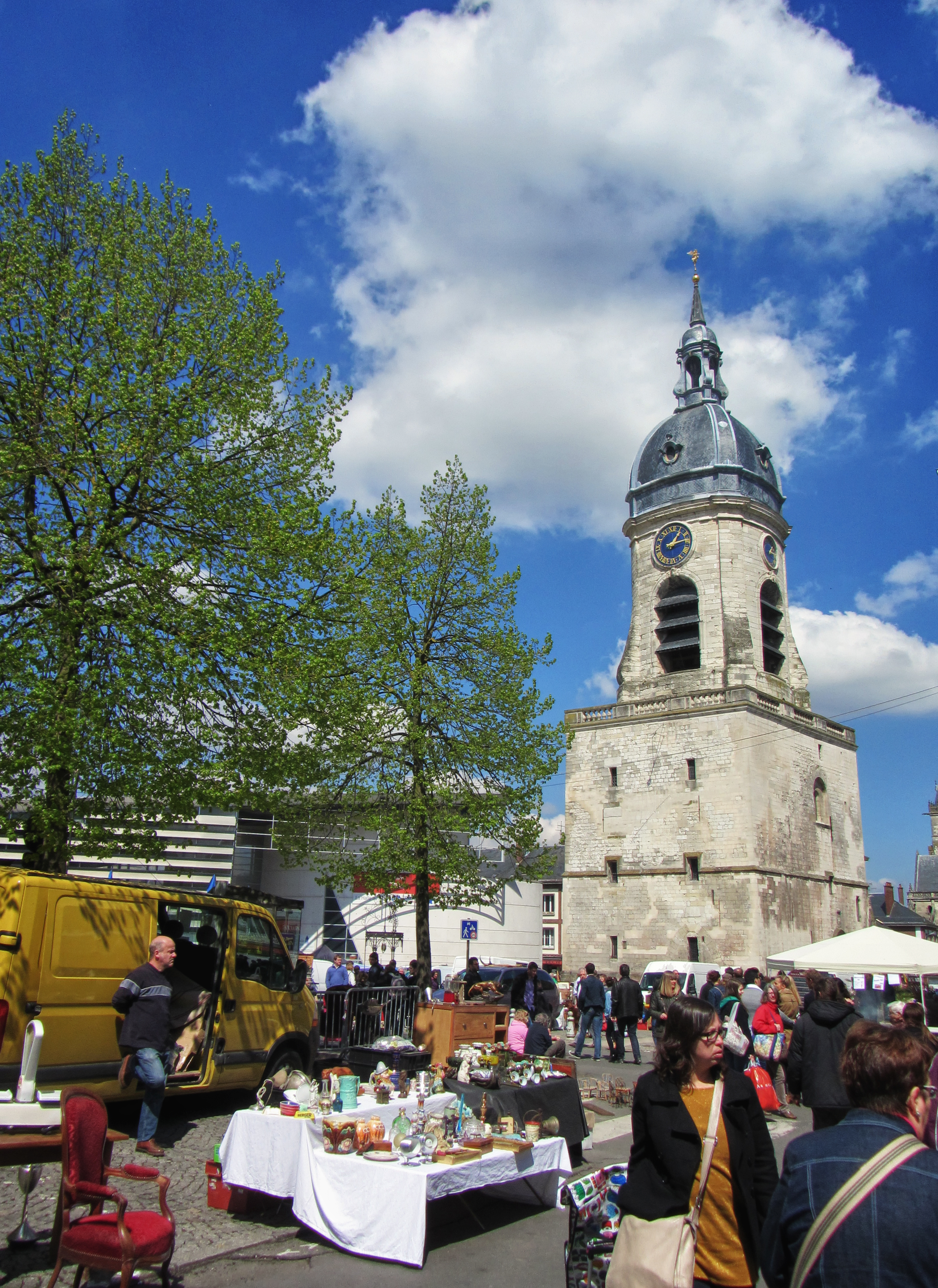 La Grande Réderie d'Amiens 2013 depuis la place du Beffroi.